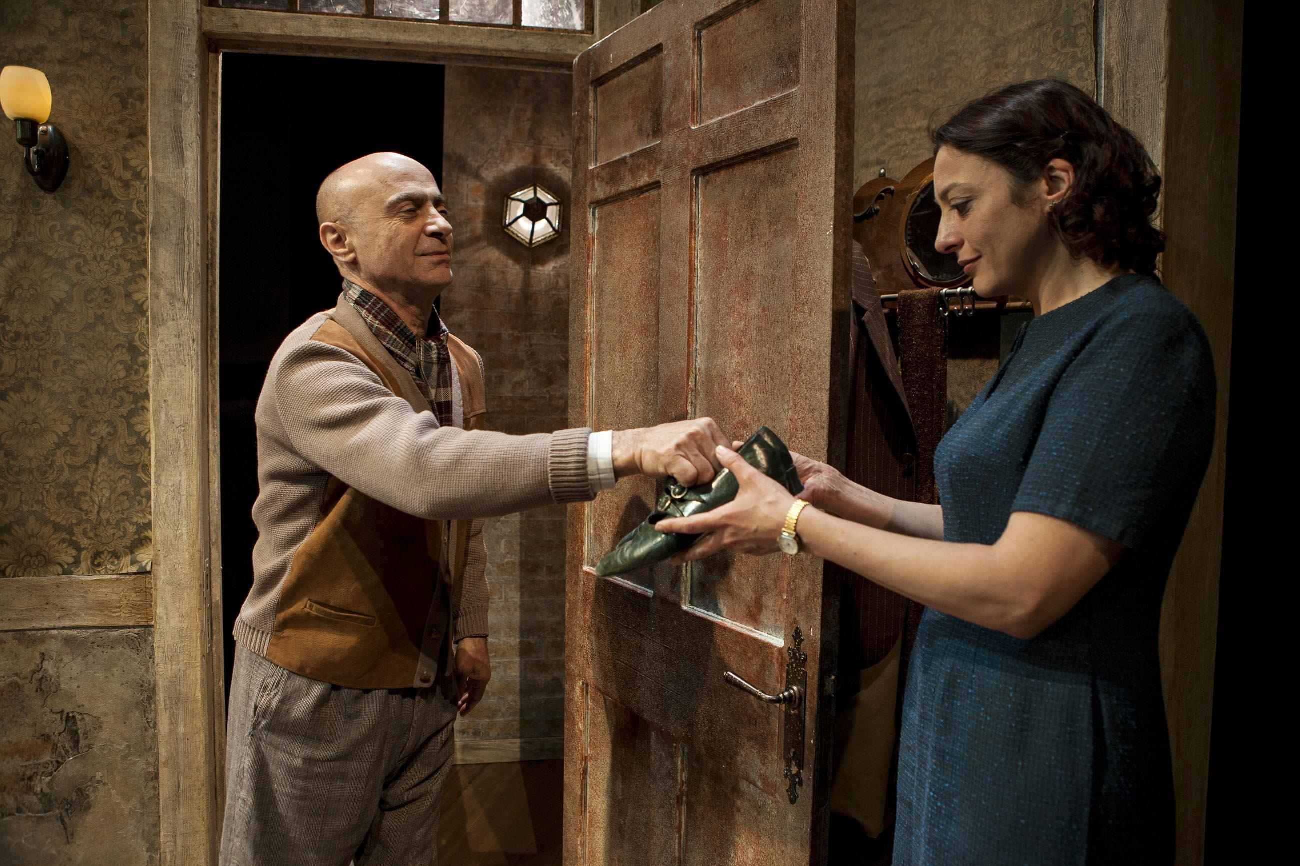 הלנה ירלובה וסאלים דאו בהצגה "אנשים קשים" מאת יוסף בר-יוסף, בבימויו של משה נאור, תיאטרון חיפה, 2012